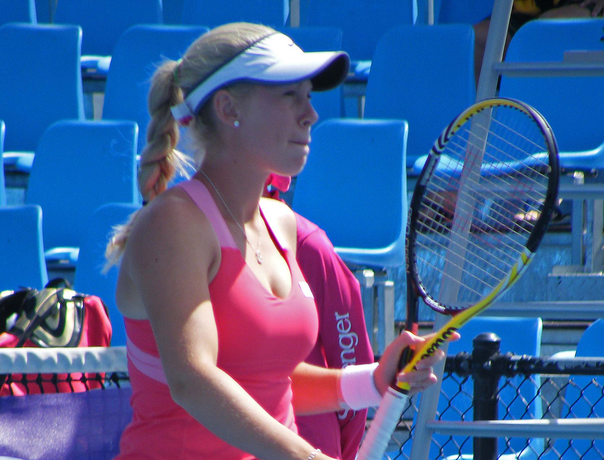 Tammi patterson